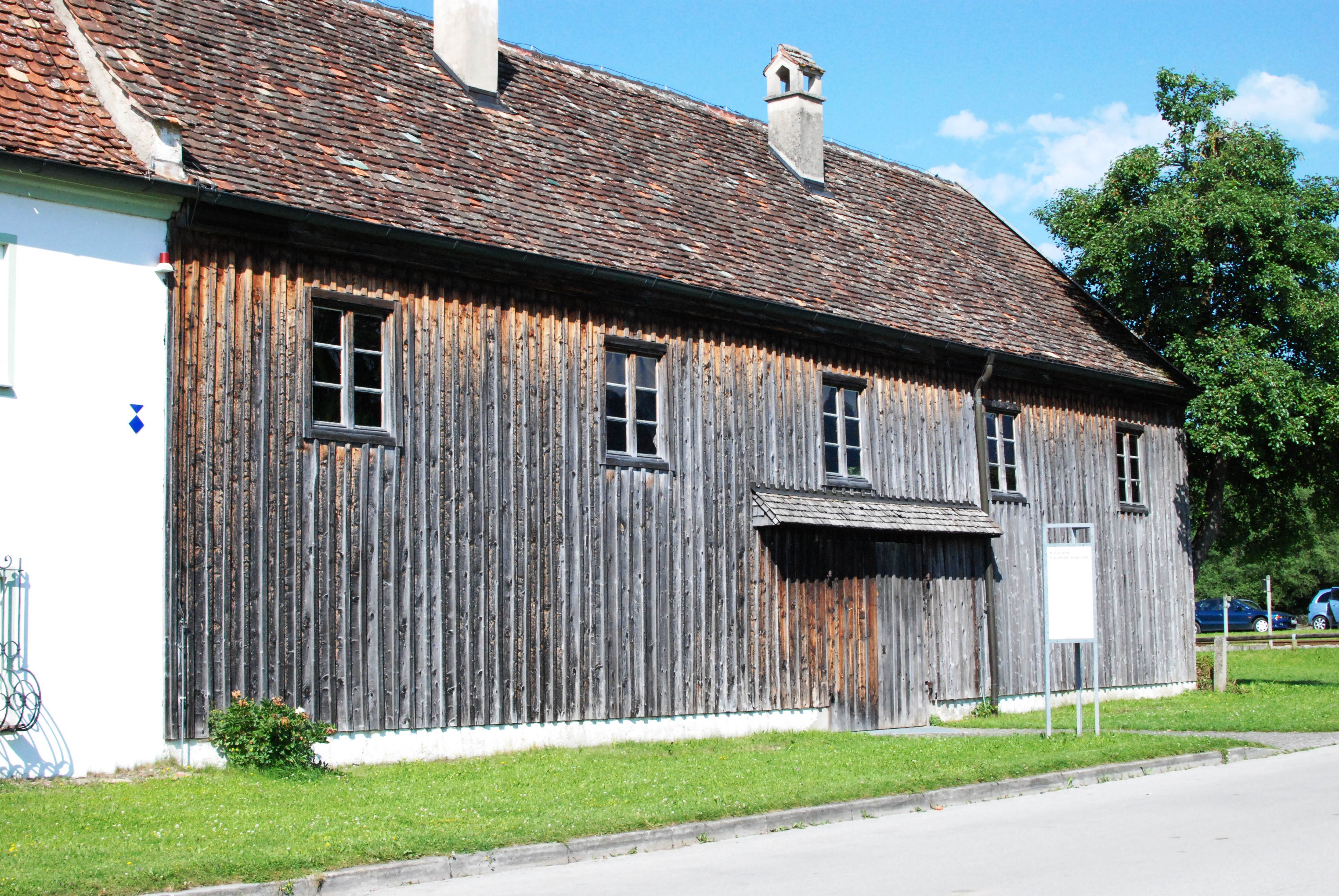 Ehemalige Fraunhofer-Glashütte, jetzt Fraunhofer-Museum, in der Fraunhoferstraße 2 in Benediktbeuern, Landkreis Bad Tölz-Wolfratshausen, Regierungsbezirk Oberbayern, Bayern. Als Baudenkmal unter Aktennummer D-1-73-113-24 in der Bayerischen Denkmalliste aufgeführt. Laut Denkmalliste im Kern spätes 17. Jahrhundert, 1843 umgebaut.